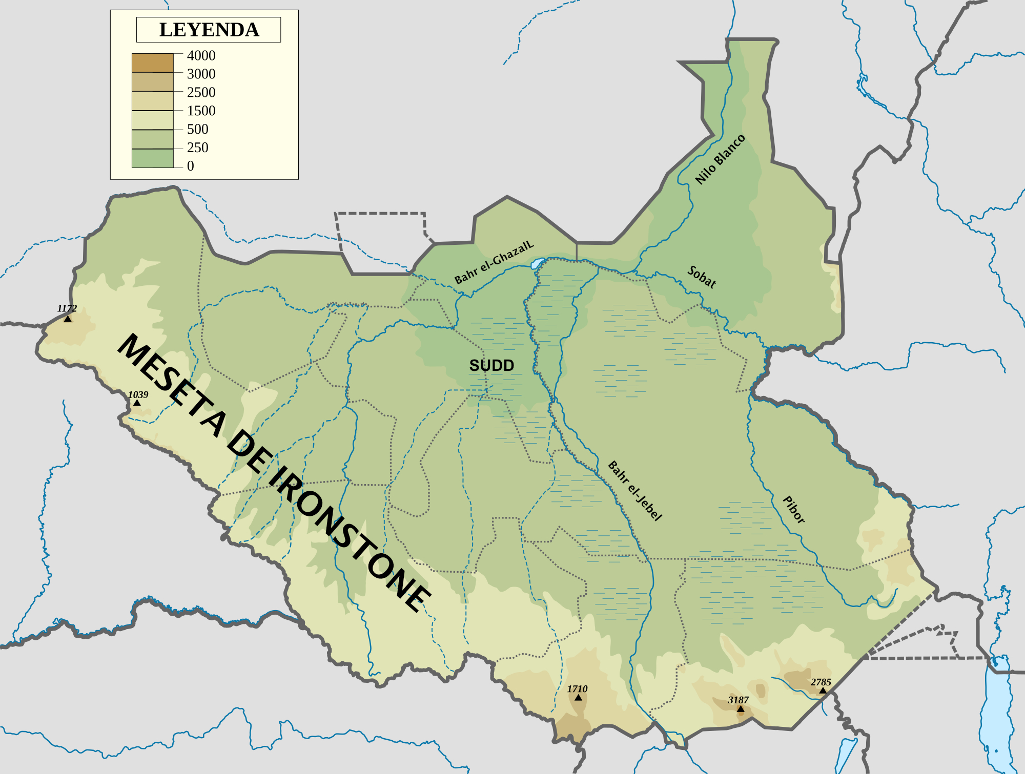 Utilizo el mapa topográfico de Sudán del Sur de Commons para añadir la meseta de Ironstone